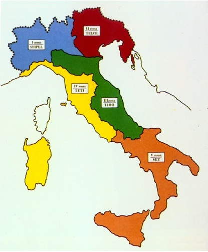 la cartina mostra la suddivisione territoriale delle concessionarie telefoniche